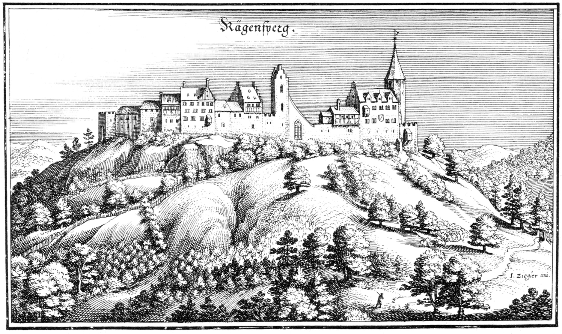 Die Stadt Regensberg im Kanton Zürich, Schweiz, in der Topographia Helvetiae von Matthäus Merian. Ca. 1650